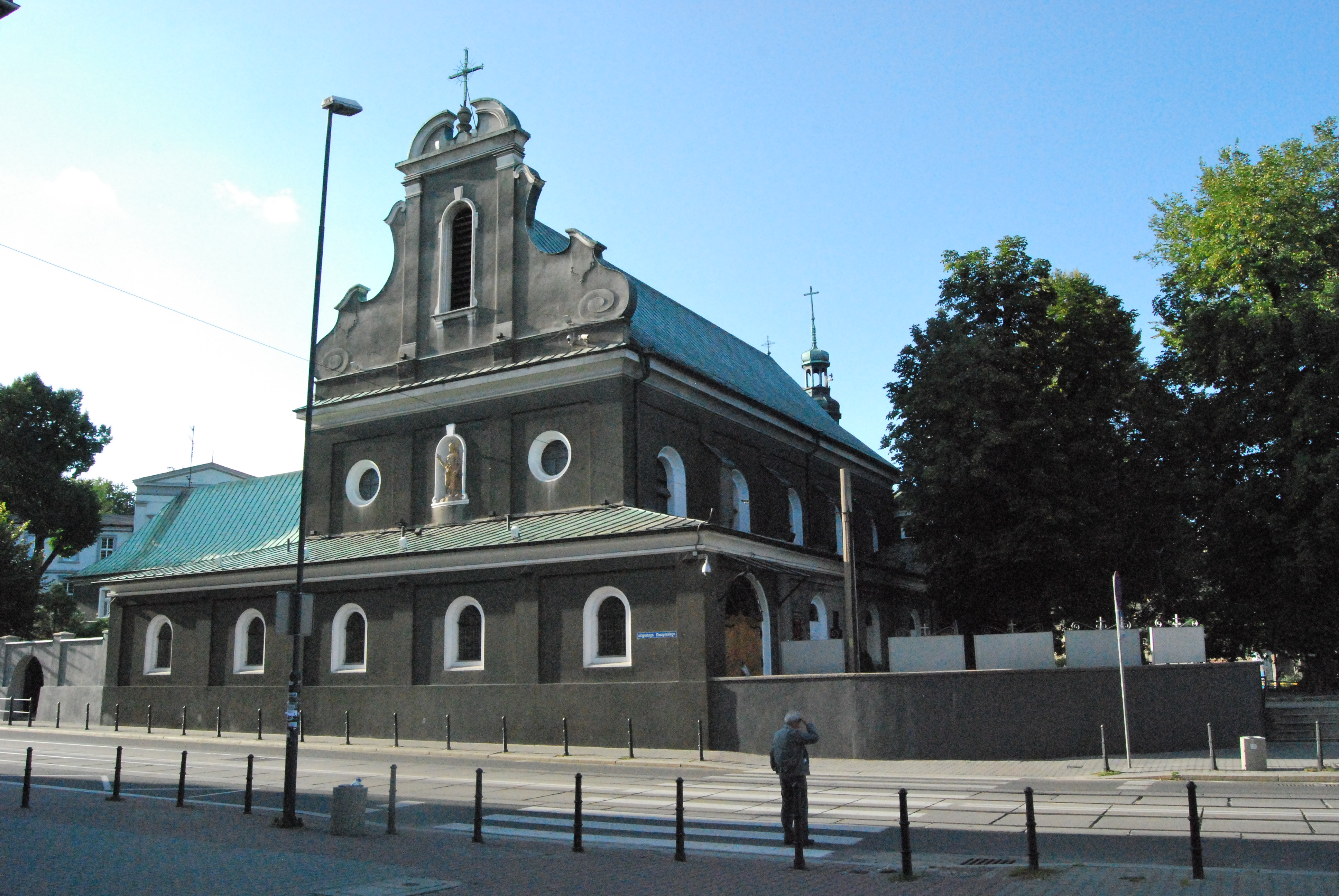 województwo śląskie Gliwice A/324/60 z dnia 10.03.1960 r. Kościół Ojców Redemptorystów p. w. Świętego Krzyża Gliwice, ul. Daszyńskiego 2 Gliwice